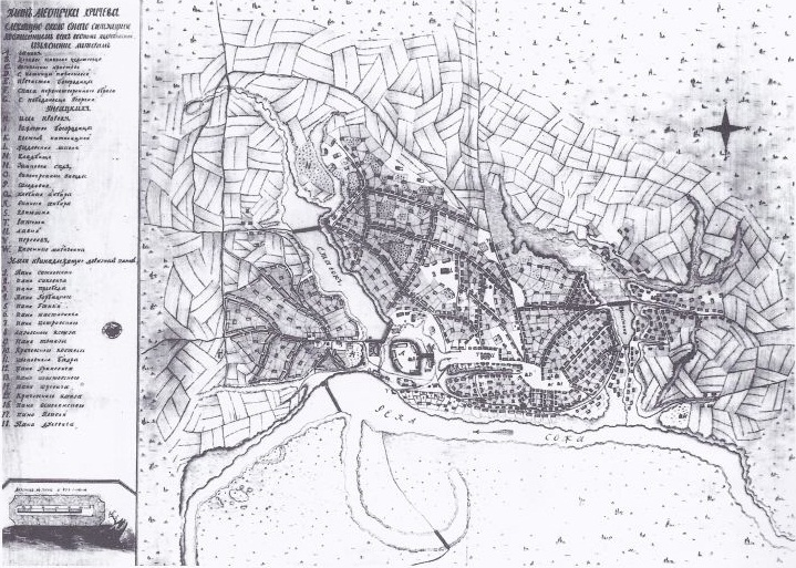 Крычаў. План 1788 г. (РДВГА)